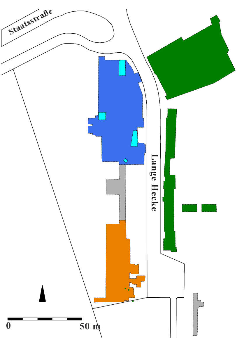 Der Plan der Ausgrabungsflächen von 1988/89 (nach F. Teichner): grün: Siedlung der Urnenfelderkultur blau: Gräberfeld der Völkerwanderungszeit türkis: urnenfelderzeitliche Siedlungsspuren unter völkerwanderungszeitlichen Befunden orange: völkerwadnerungszeitliche Siedlung grau: befundleer grüne Punkte: urnenfelderzeitliche Urnenbestattungen